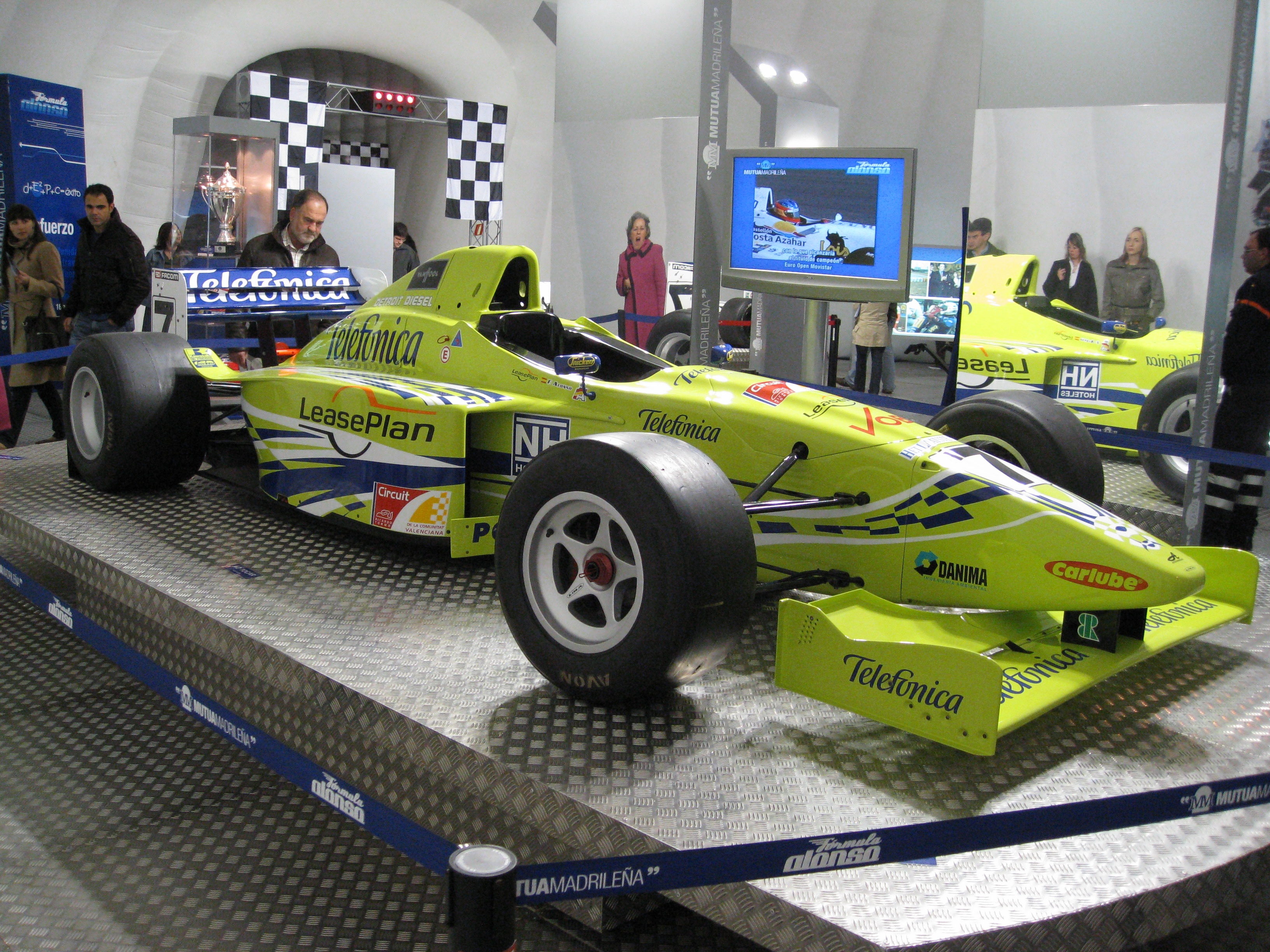 Fórmula 3000 de Fernando Alonso